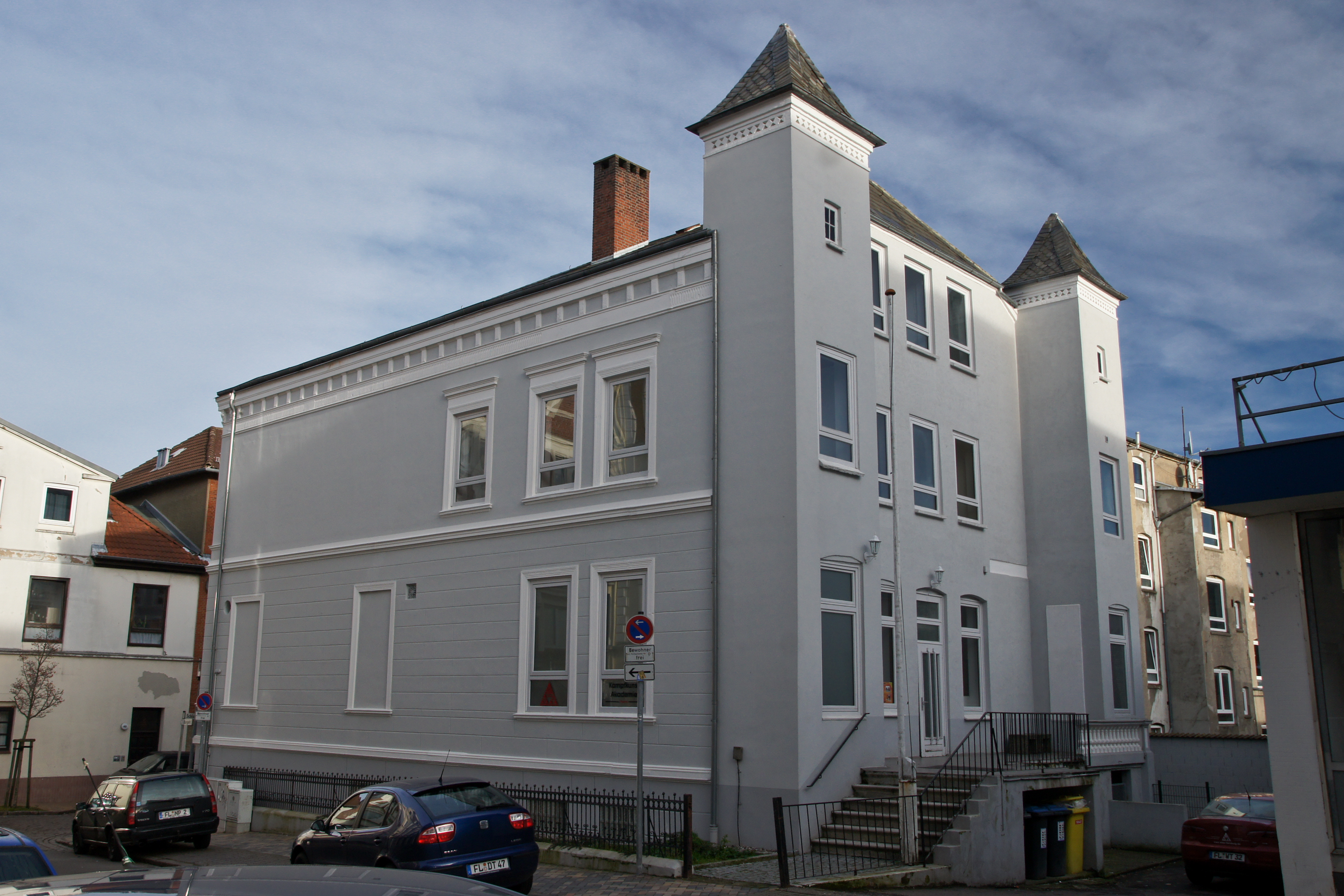 Flensburg-Neustadt, Schloßstraße 35, Guttempler Haus, Denkmal Nr. 19. Sicht auf Rückseite Burgstr.